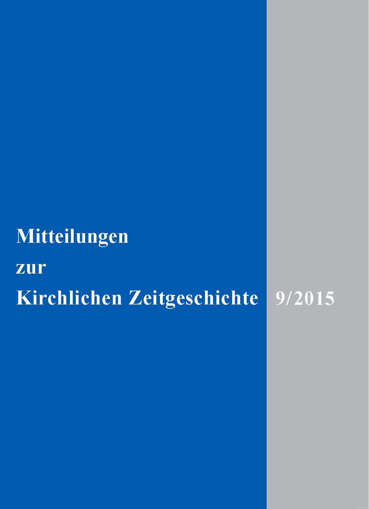 „Mitteilungen zur Kirchlichen Zeitgeschichte“ - Bd. 9/2015